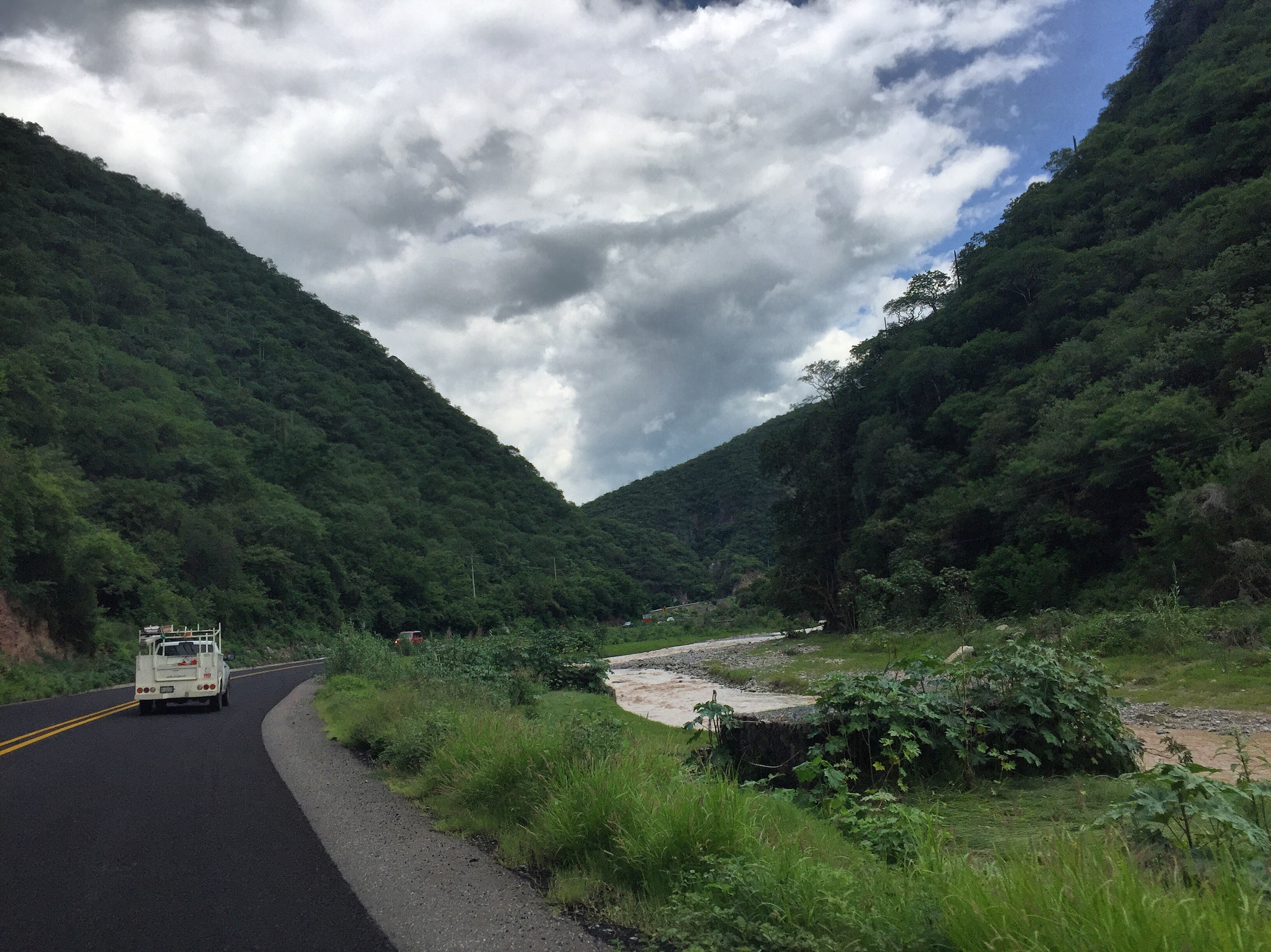 Cañon del Zopilote en el estado de Guerrero, sur de México. A la derecha, la carretera Federal 95 (México - Acapulco).